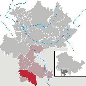 Hellingen in Thuringia - district Hildburghausen